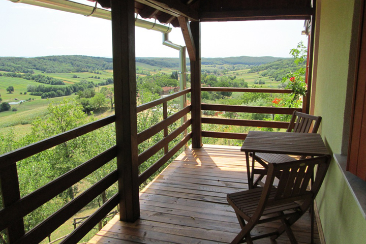 Pogled s terase bakine vikendice